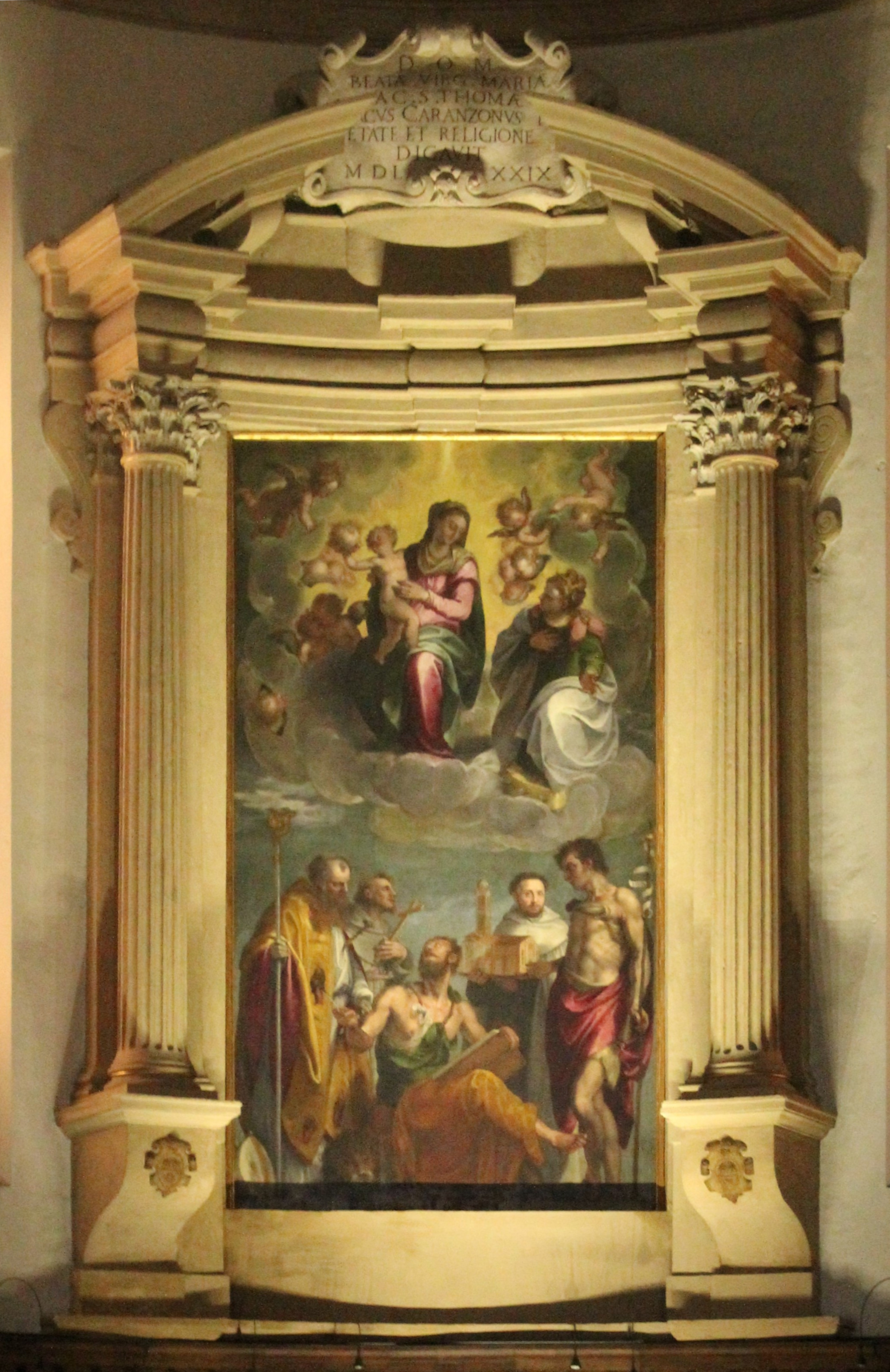 Pala Vergine e Santi di Felice Brusasorzi per l'altare maggiore San Tomaso, Verona